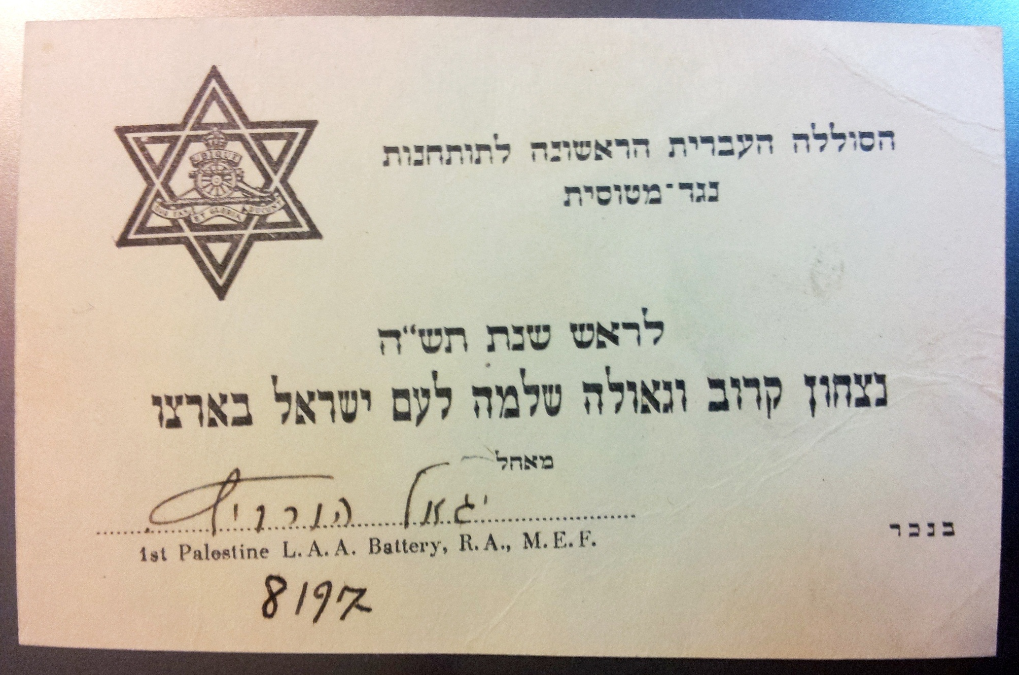 איגרת שנה טובה